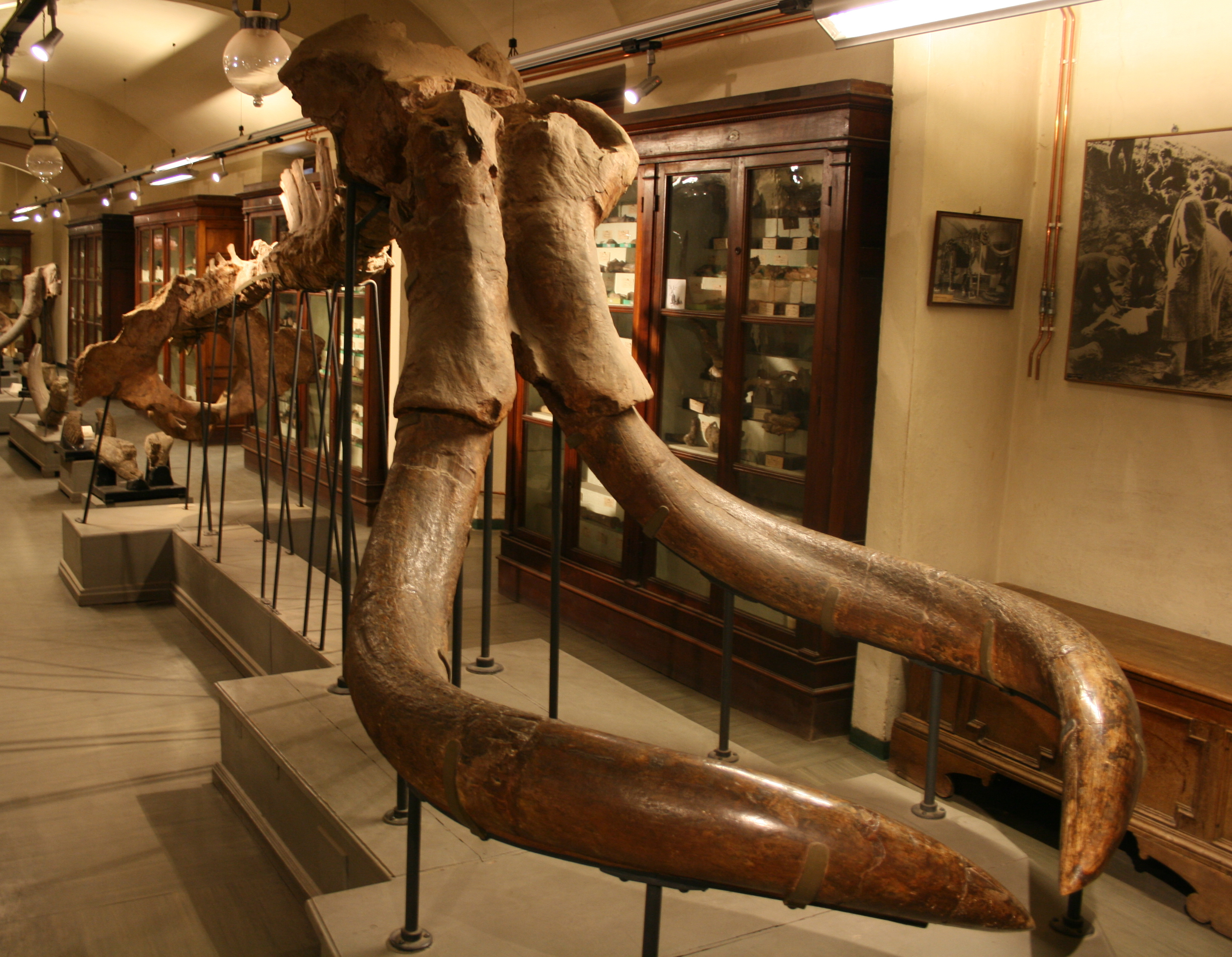 Museo Paleontologico di Montevarchi - Mammuthus meridionalis